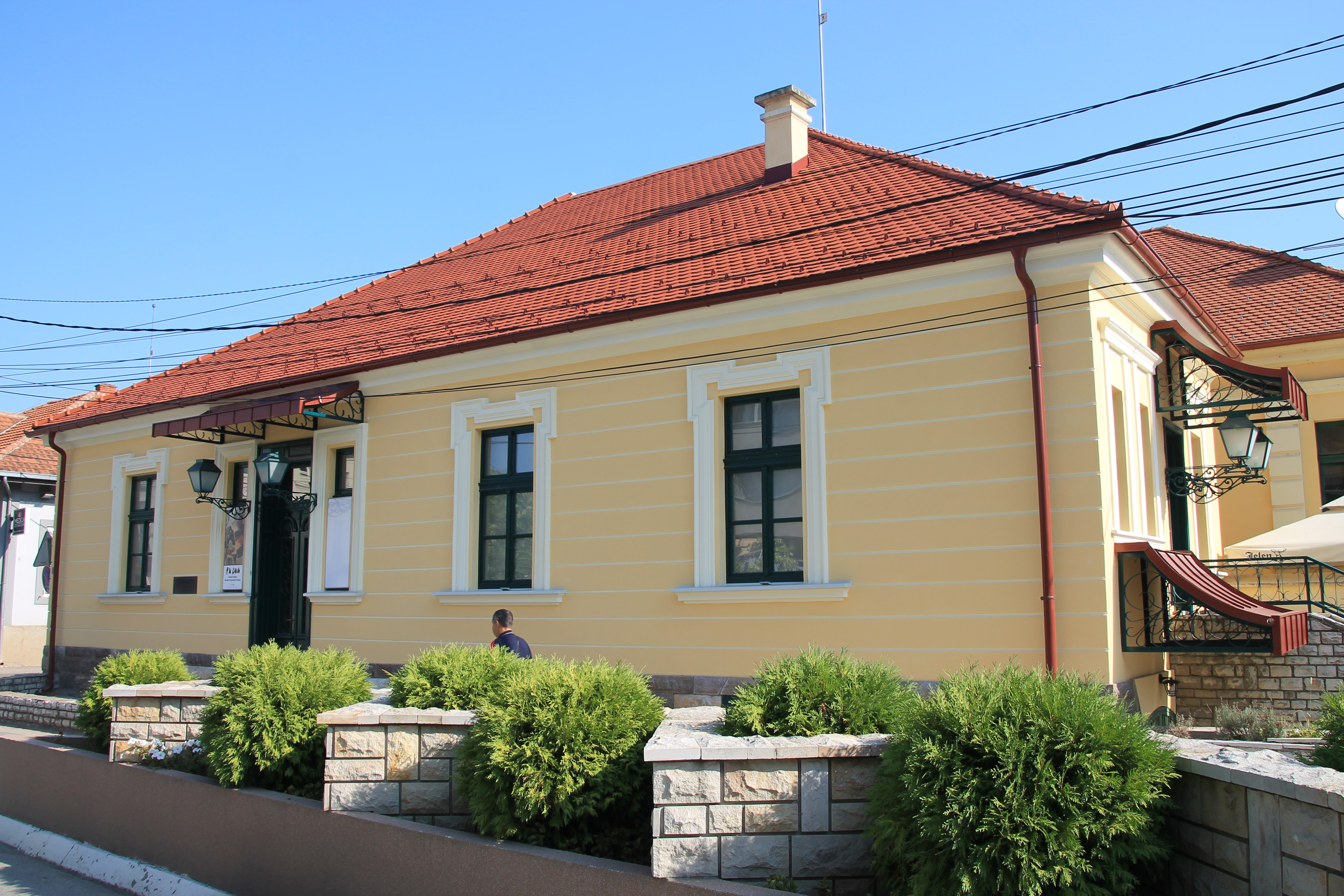 Buildings in Čačak